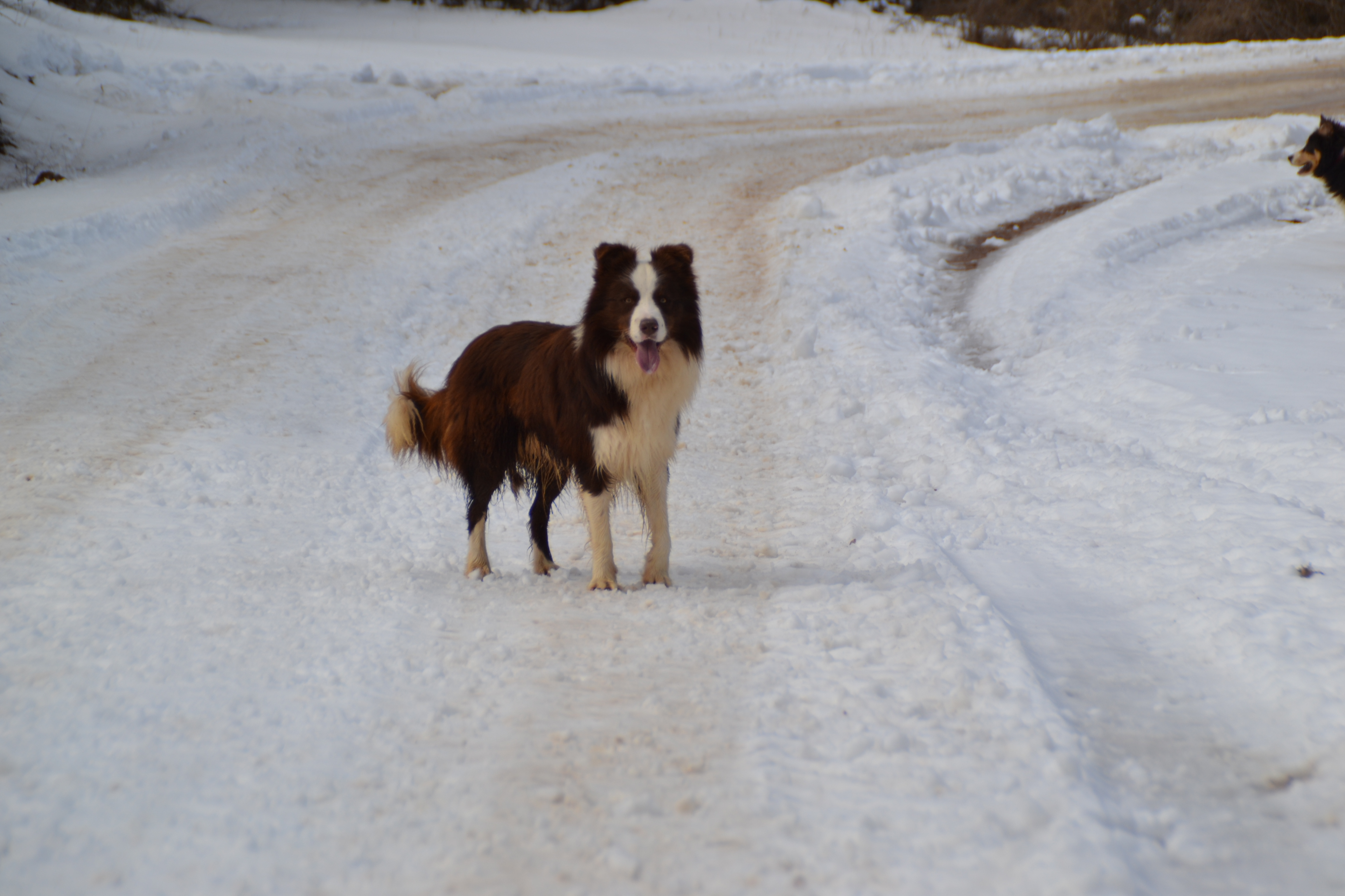 Border Collie macho chocolate y buen porte